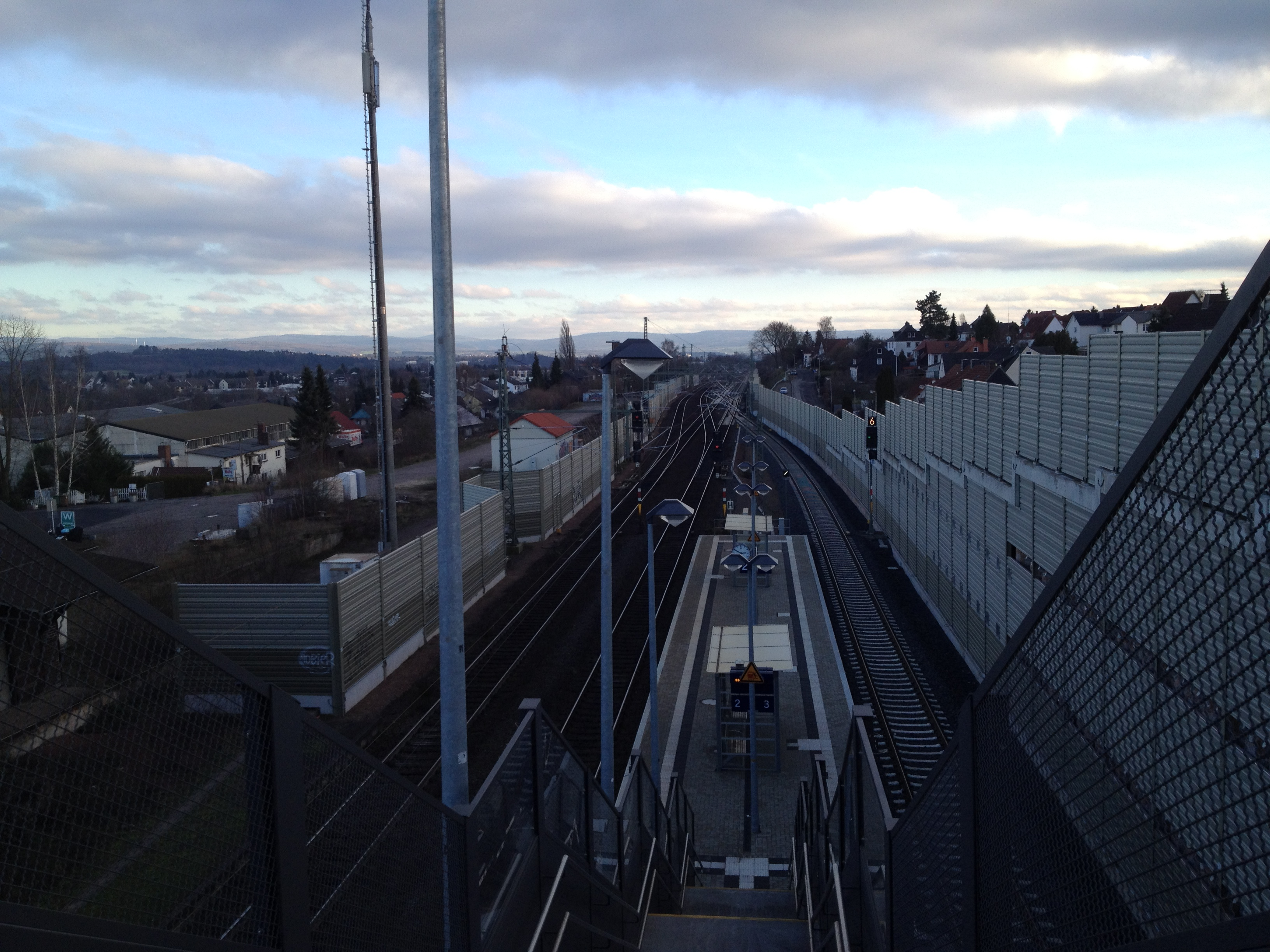 Blick die Treppen hinunter auf die Gleise 2 und 3, im Hintergrund der Bahnhof Vellmar-Osterberg/EKZ